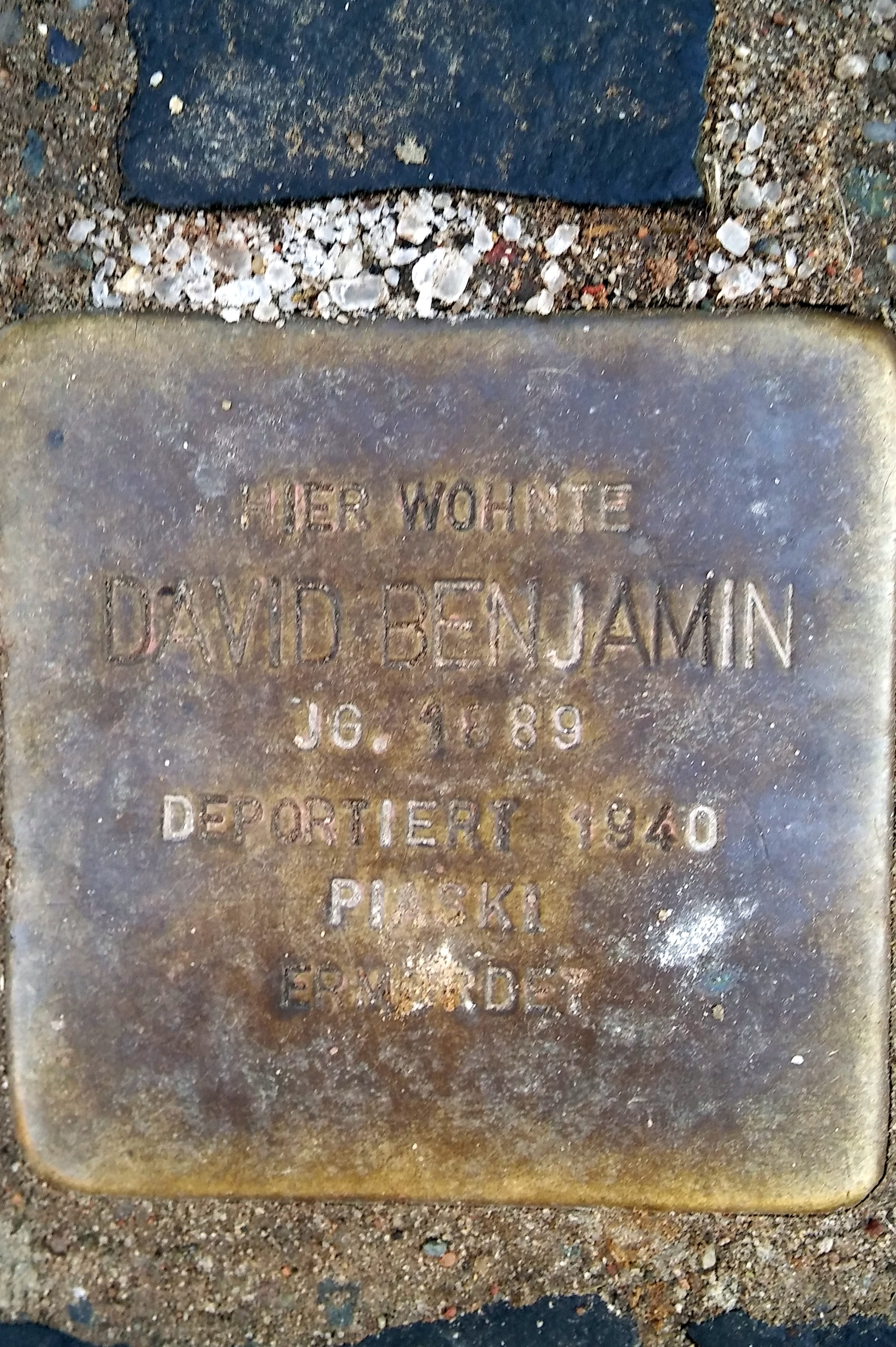 Stralsund, Langenstraße 27, Stolperstein David Benjamin